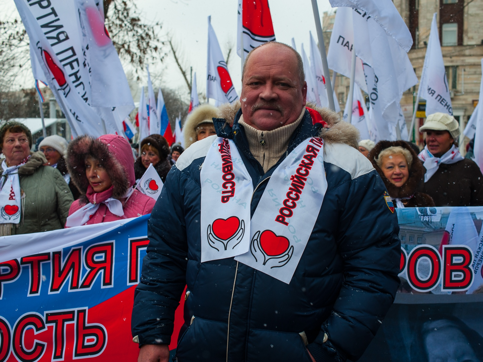 Зотов Игорь Львович - председатель "Российской партии пенсионеров за справедливость", депутат Госдумы России 6-го созыва